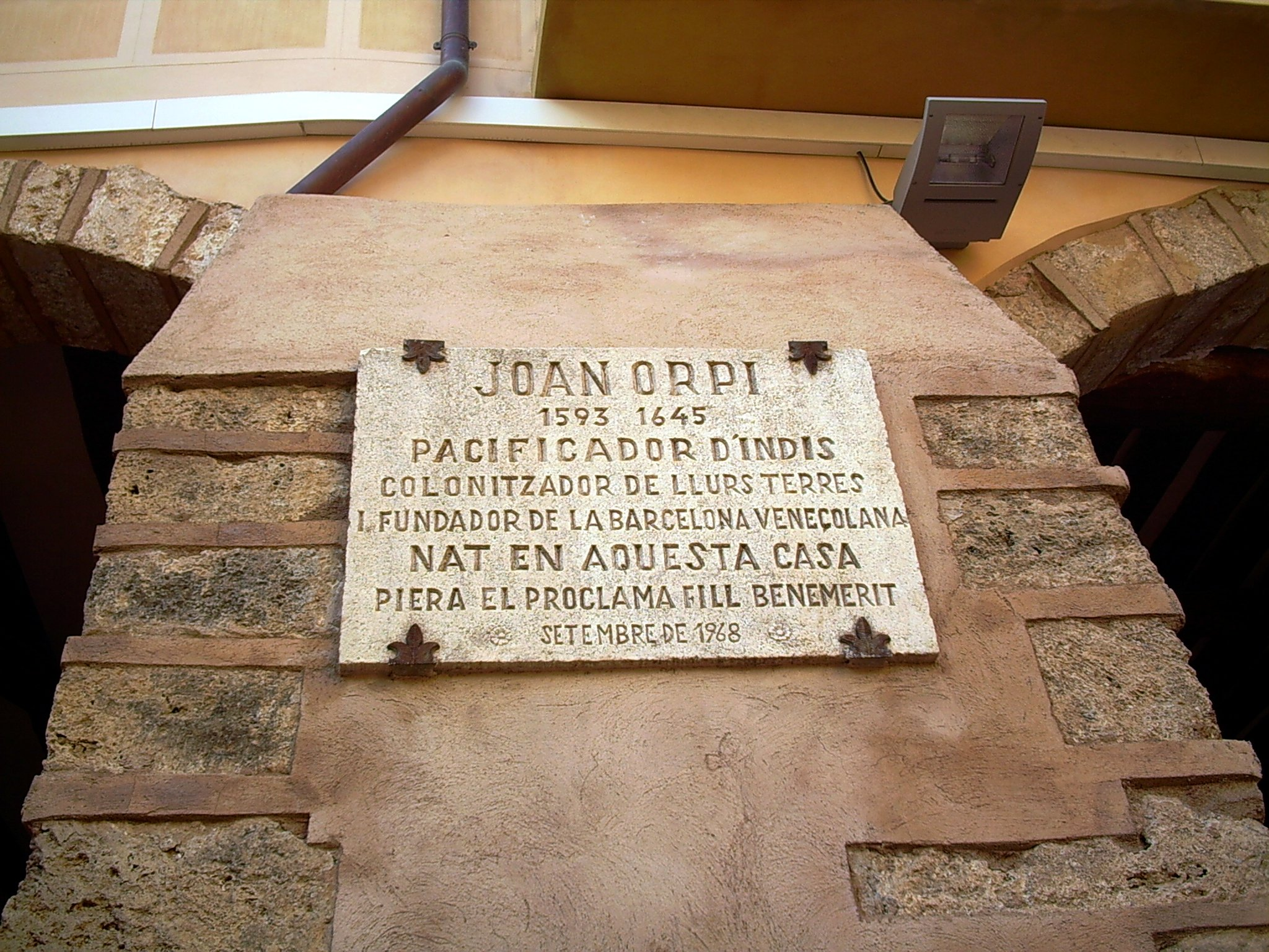 Placa de la casa de Joan Orpí i del Pou, a Piera, l'Anoia, (Catalunya).